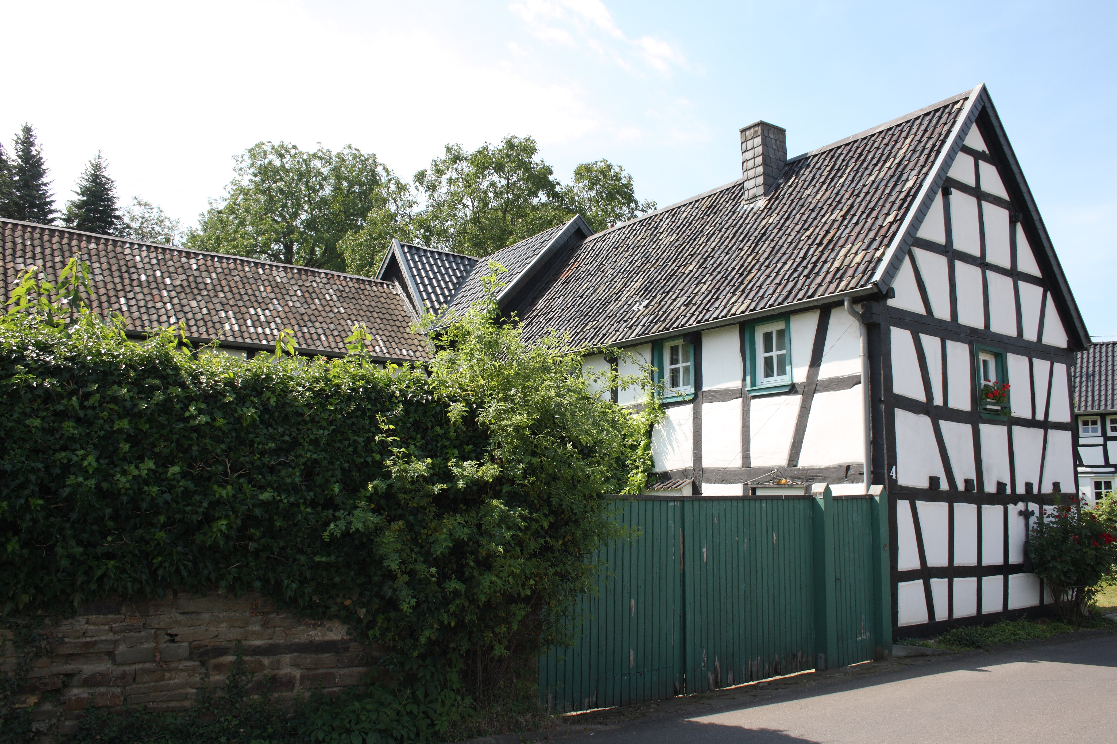 Fachwerkhof in Obervinxt, einem Ortsteil von Schalkenbach, Karweg 4